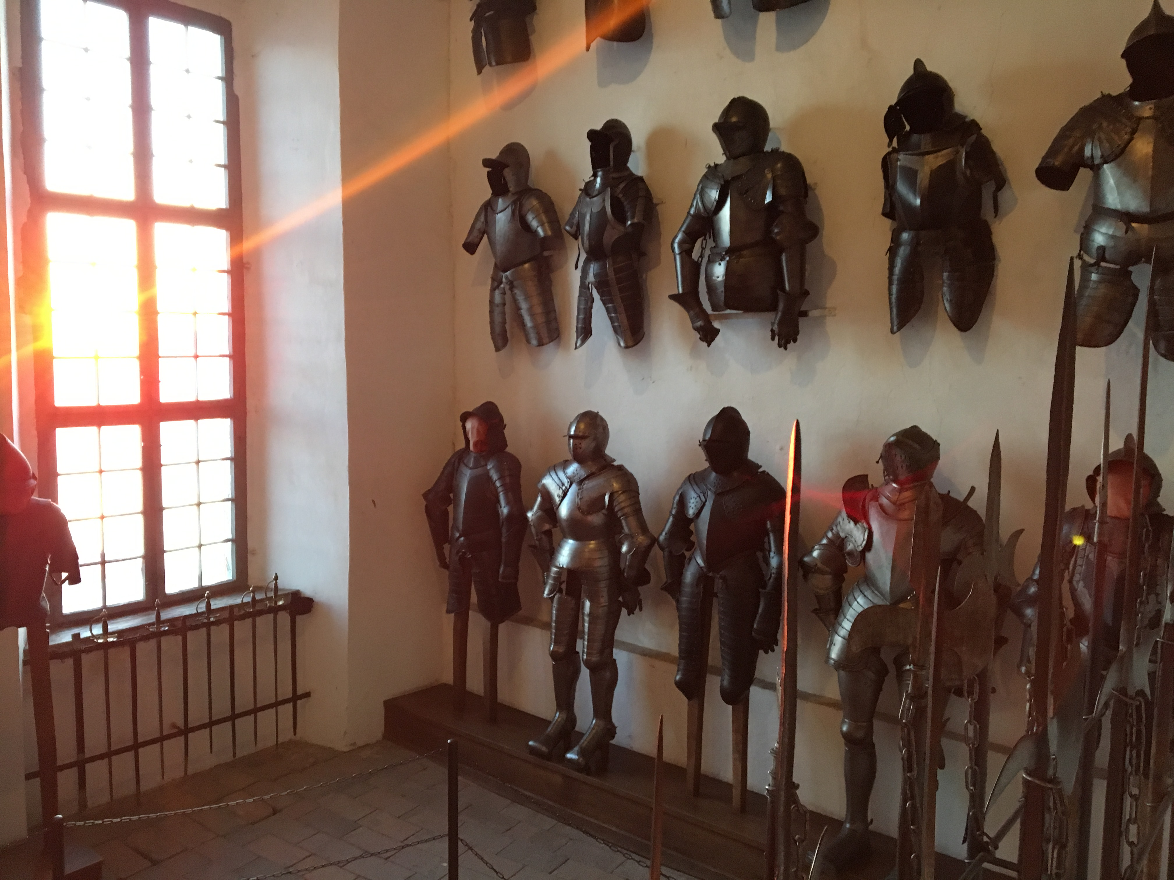 Armaduras medievais localizadas no Castelo Velho da cidade de Meersburg, Alemanha, ao pôr do sol.